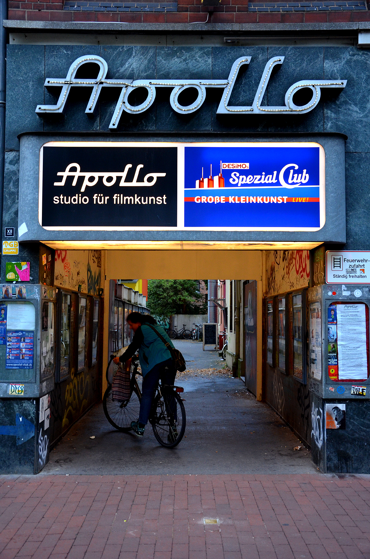 Vor dem Durchgang zur Limmerstraße 50 in Hannover, dem Zugang unter anderem zum Apollo-Kino (Apollo - Studio für Filmkunst) und zu DESiMOs Special Club, wurde am 18. September 2013 ein Stolperstein verlegt zum mahnenden Gedenken an eines von tausenden Opfern aus der Zeit des Nationalsozialismus. Die Inschrift lautet: „Hier wohnte Elsa Cranz, geb(orene) Boje, J{ahrgan)g 1917, Zeugin Jehovas, verhaftet, "verlegt" 14. 11. 1942, Ravensbrück, Tot 19. 11. 1943“ ...